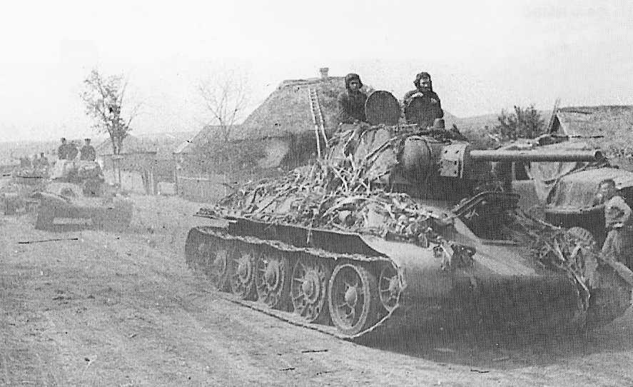 Carri T34/76 della Terza armata carri della Guardia durante l'operazione Kutuzov